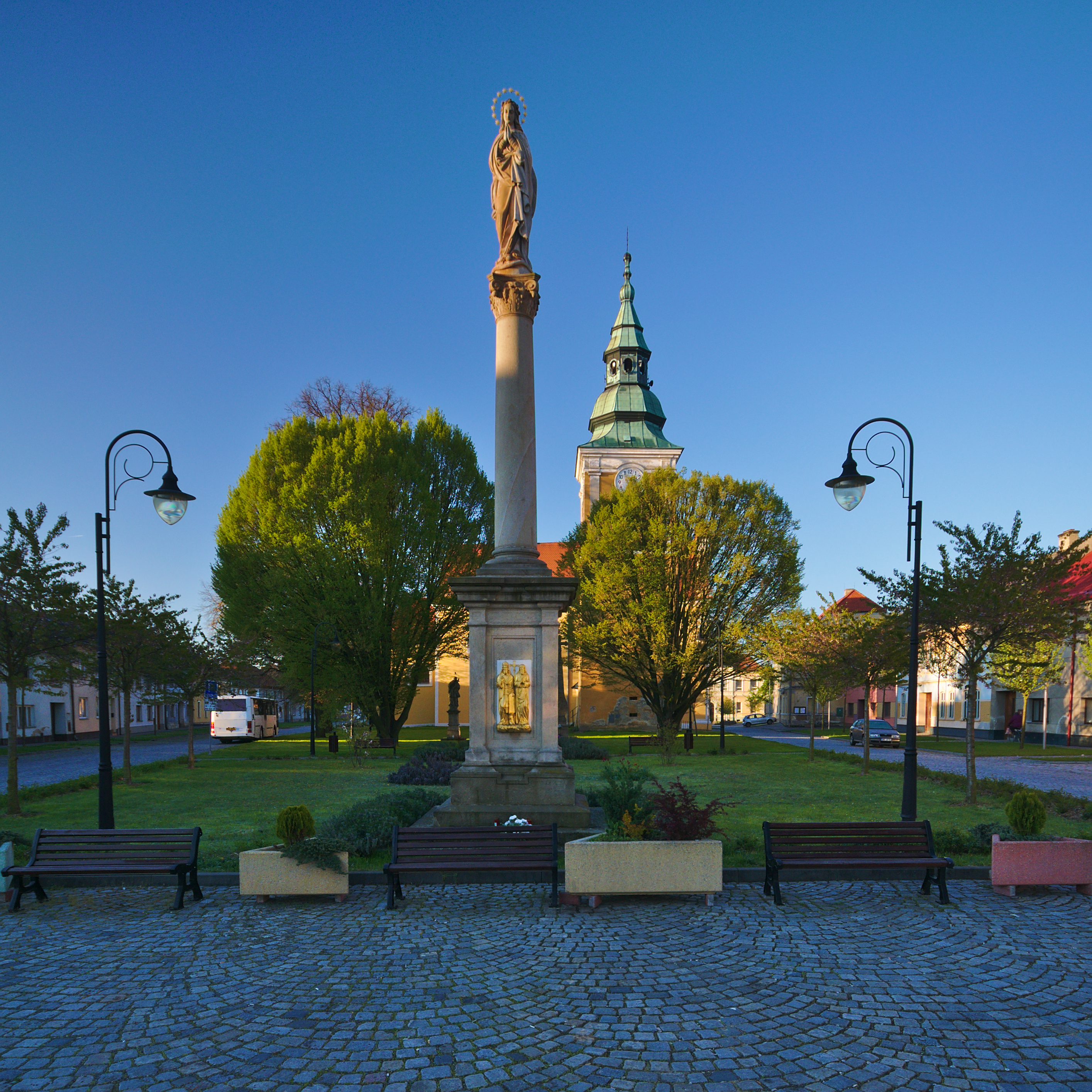 Mariánský sloup na Palackého náměstí, Němčice nad Hanou, okres Prostějov